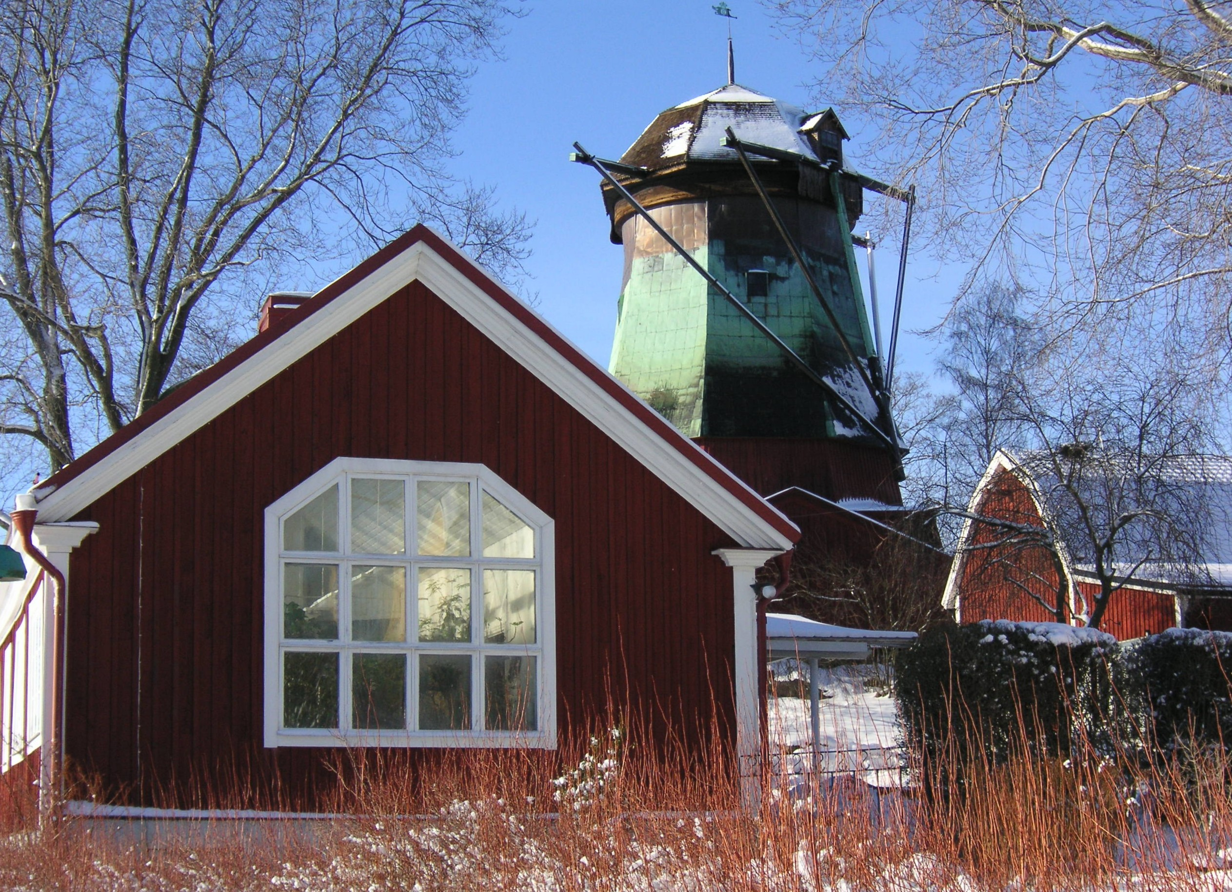 Waldemarsudde: Oljekvarn och orangeri